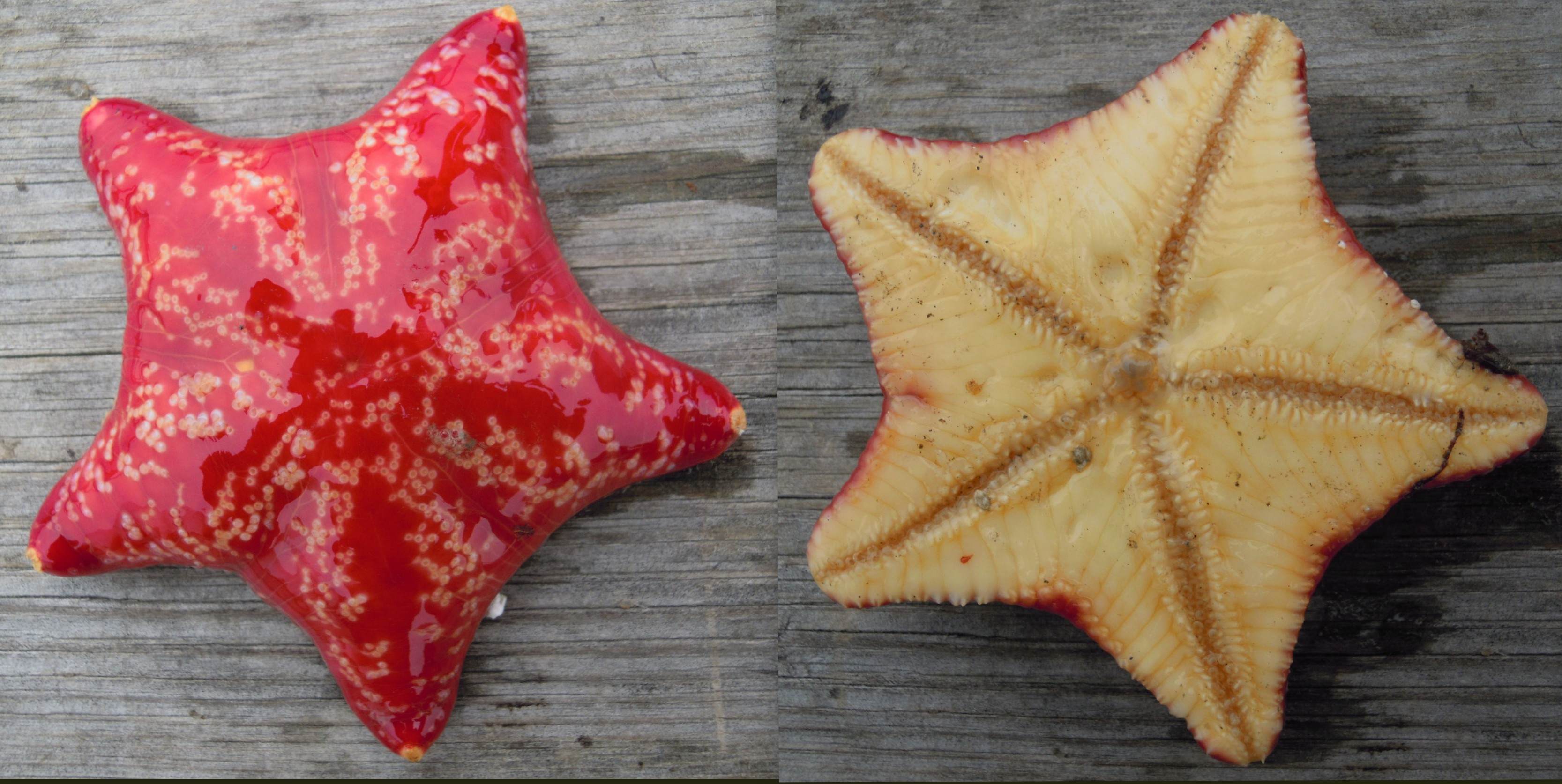 Sypute - Porania pulvillus, Stavern. You are free to use this picture outside Wikipedia (see license), as long as you write: Photo: Arnstein Rønning